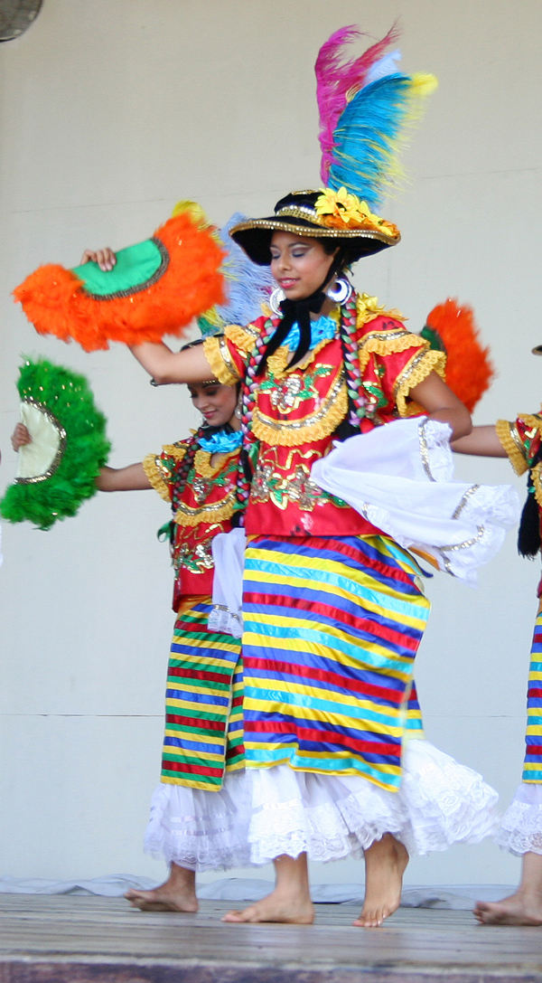 Artista Nicaragüense ejecutando el baile del Mestizaje con su traje tipico formado por el huipil y enagua